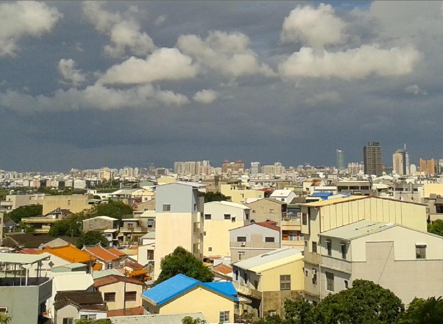 中文（台灣）: 安平古堡瞭望台所見台南市景。